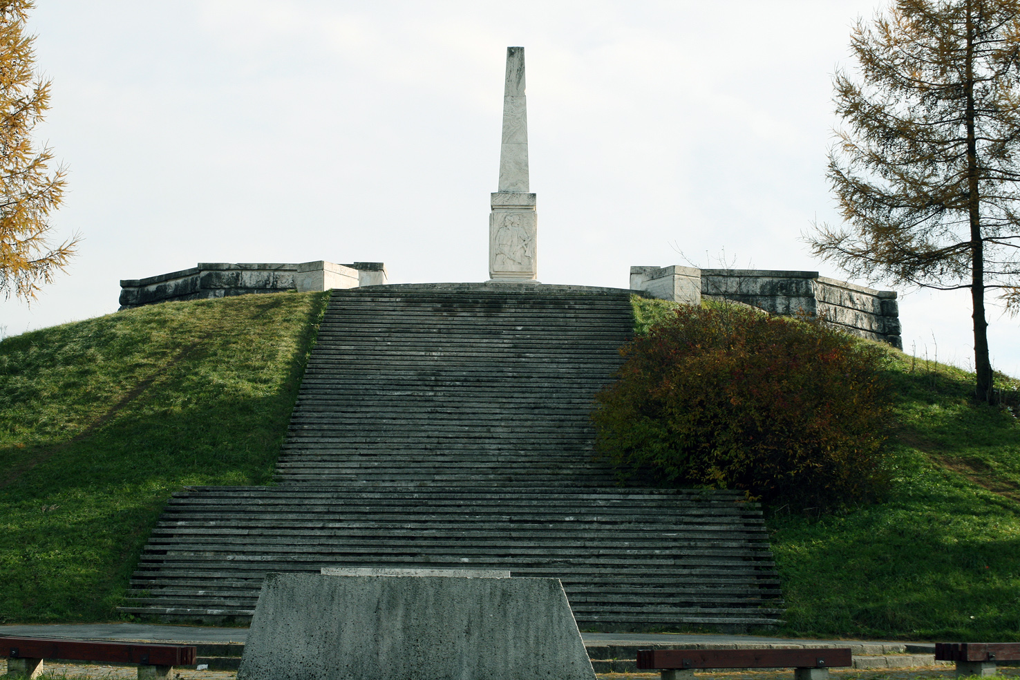 Pamätník francúzskym partizánom pri Strečne, ktorí bojovali v SNP